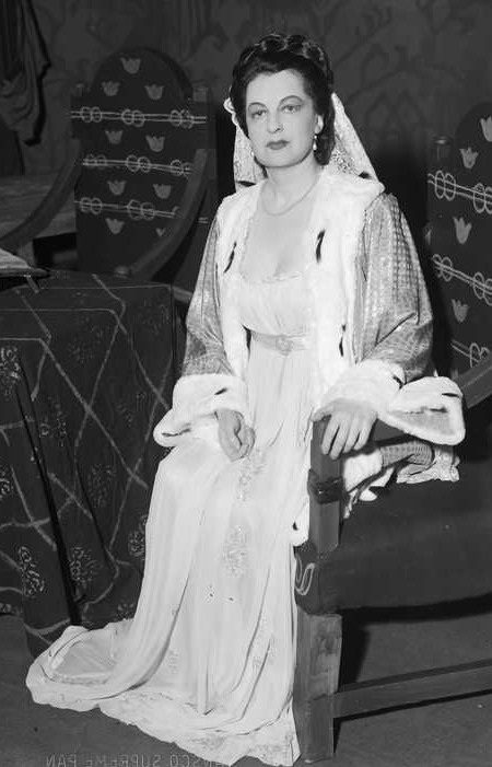 Nationaltheatret, forestilling, skuespillerinne.